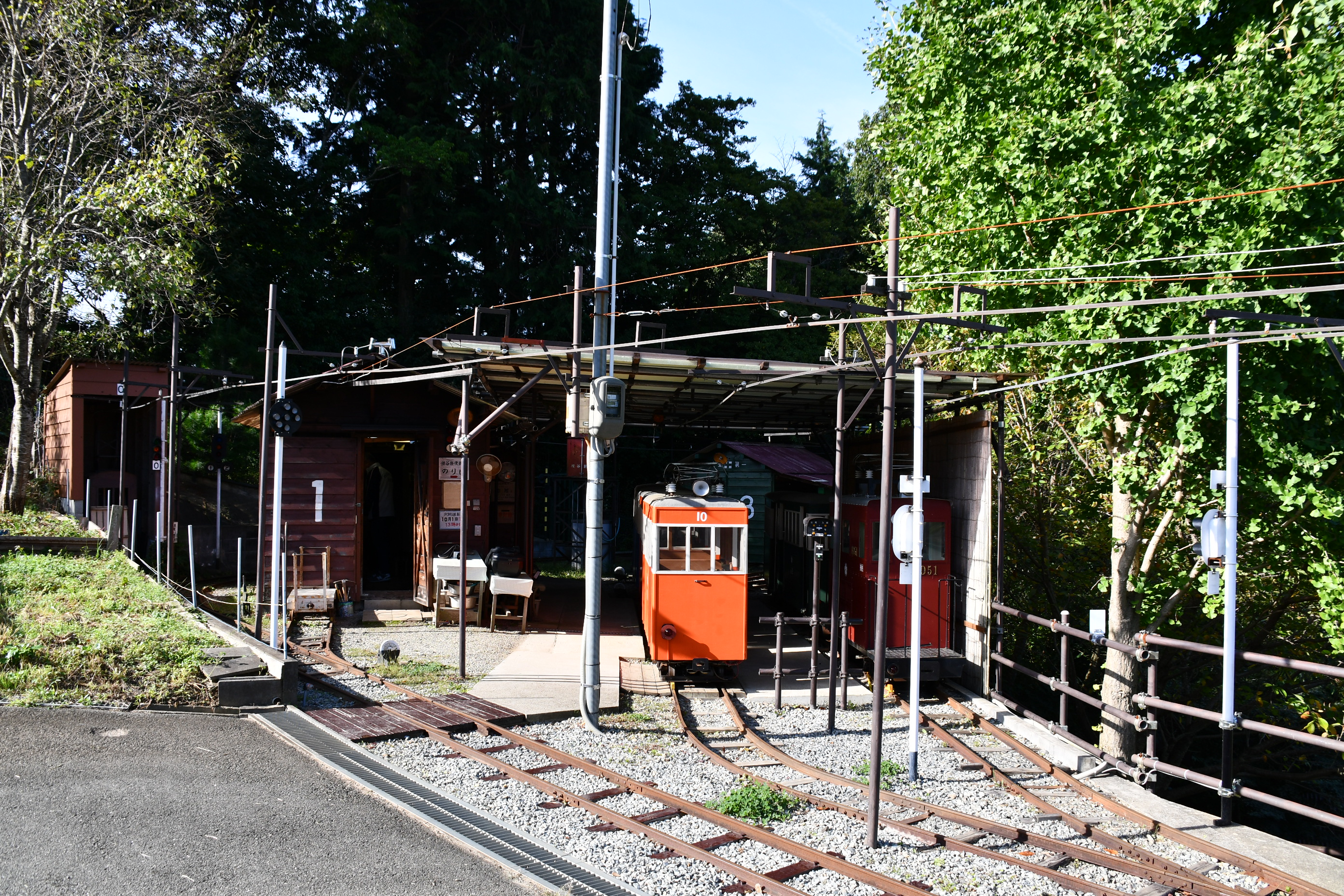 2017/10/1桜谷軽便鉄道南山線にて風の峠駅を撮影。